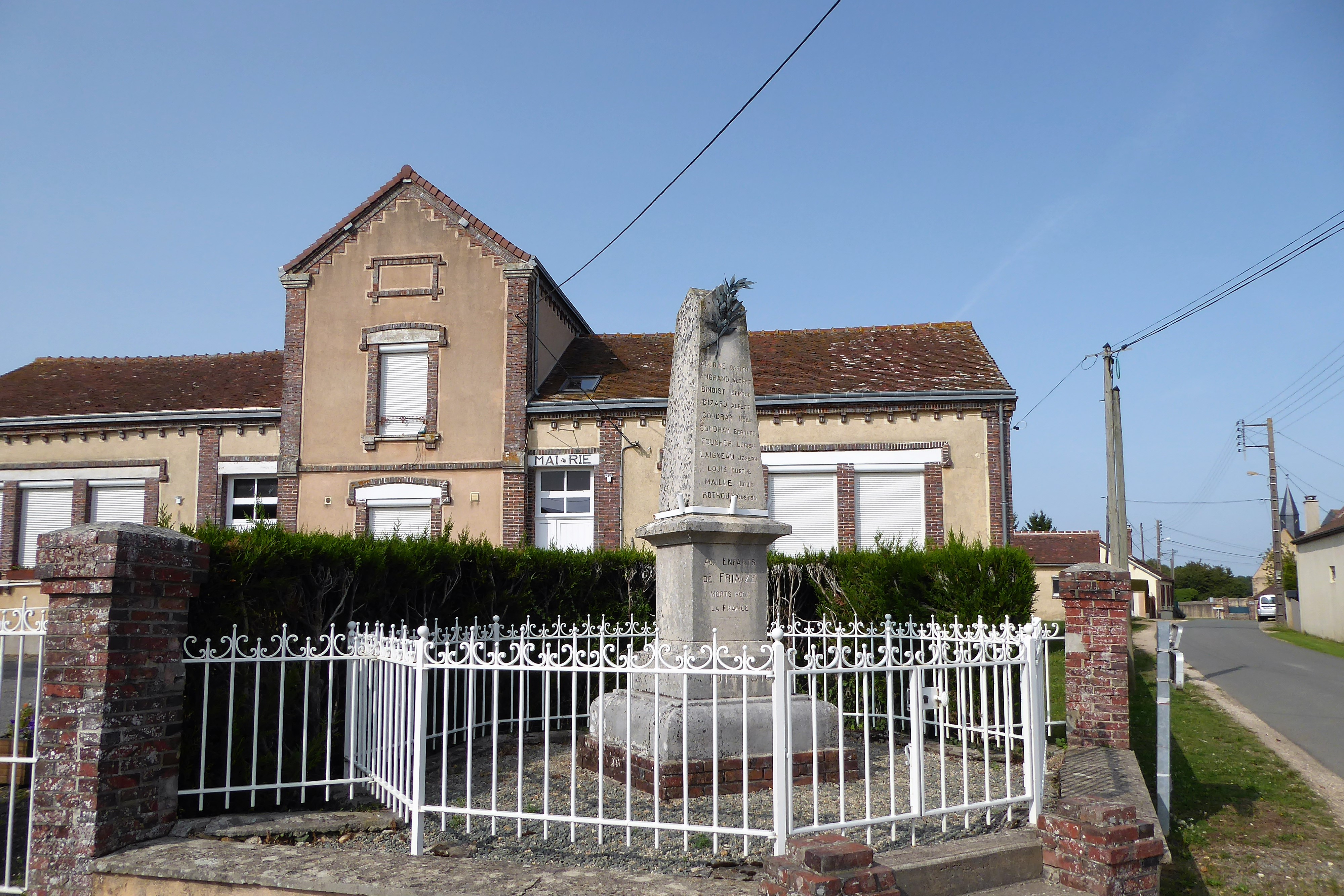 mairie, monument aux morts et clocher de l'église Saint-Maurice, Friaize, Eure-et-Loir (France).